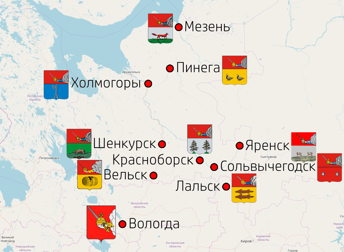 Современные гербы городов, содержащих герб города Вологды и входивших в состав Вологодского наместничества и/или Вологодской губернии, но находящиеся за пределами Вологодской области.